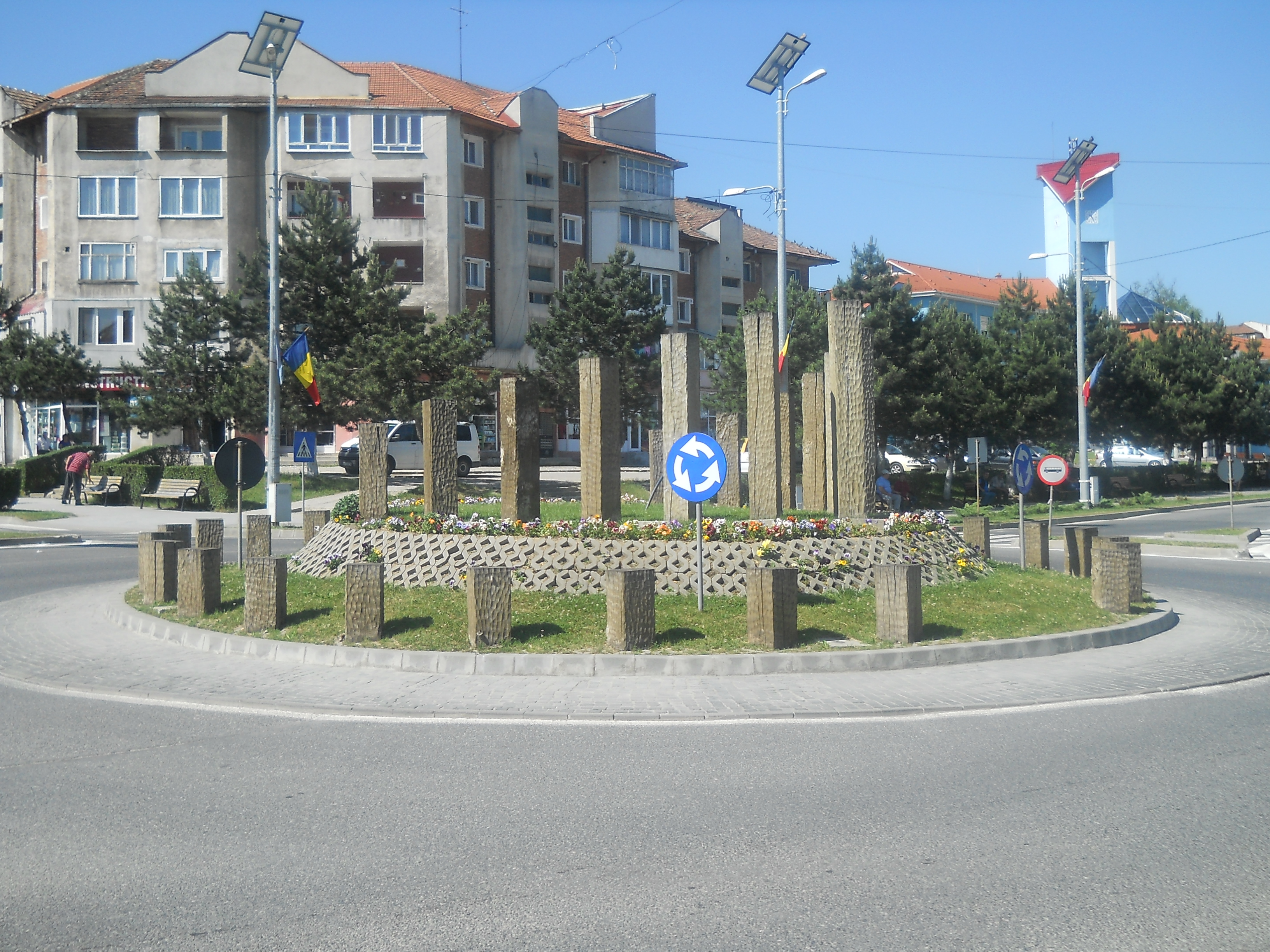 reconstrucţie a unui ceas dacic într-un sens giratoriu în oraşul Vulcan